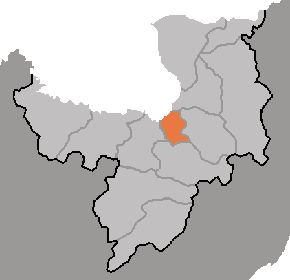 Map of Hyesan, Ryanggan-do, DPRK, 2006